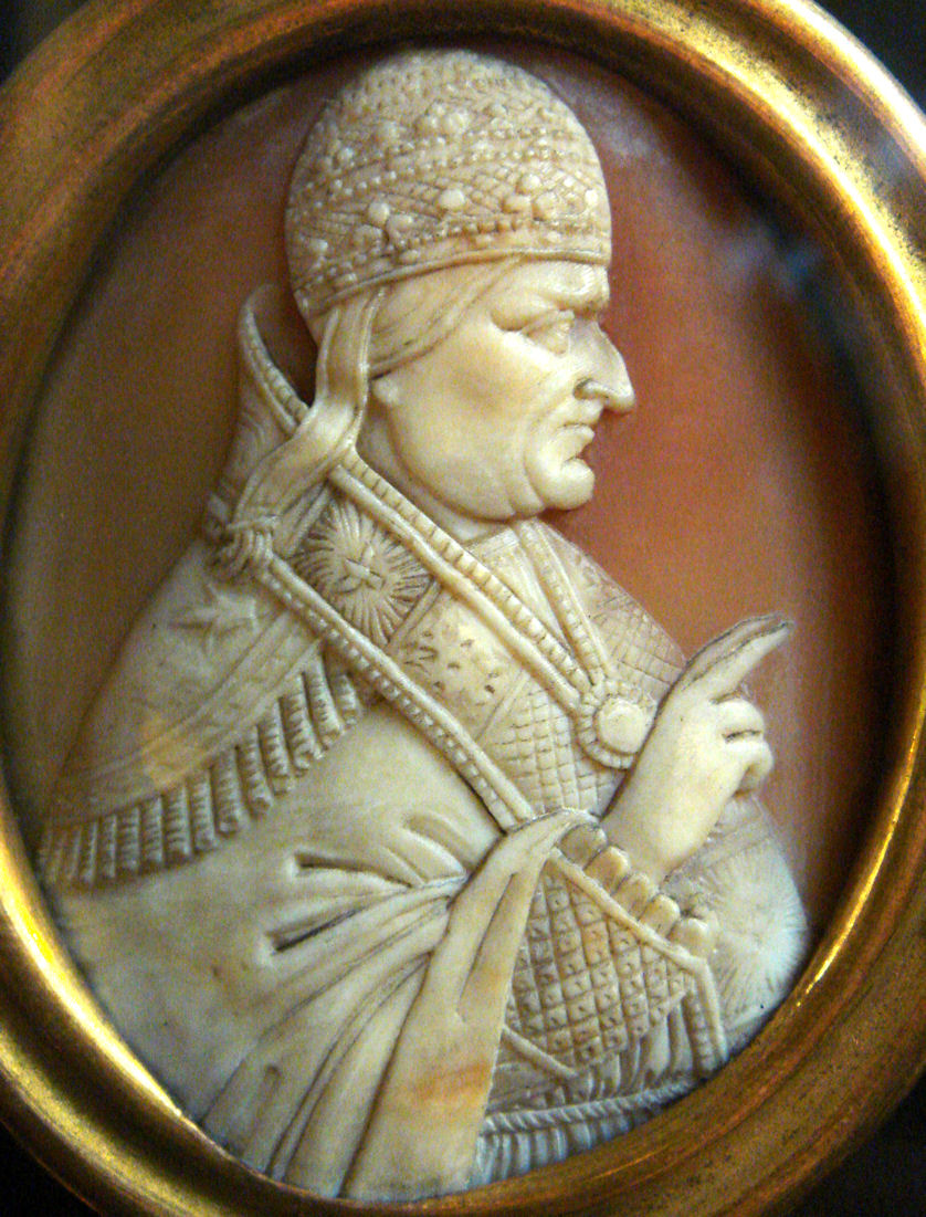 Pope Honorius IV